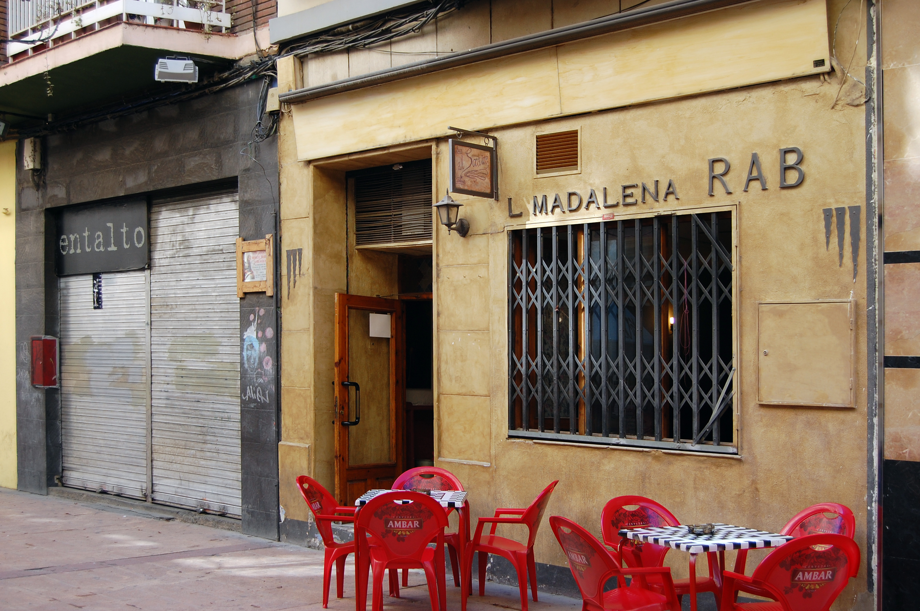 Aragonés: Tabiernas en a Madalena, Zaragoza, Aragón